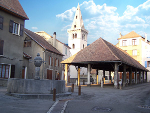 Mens, la place de la halle, lieu du marché